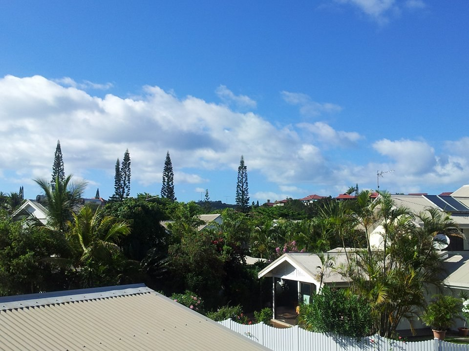 Habitations du quartier Ngéa-Tuband à Nouméa